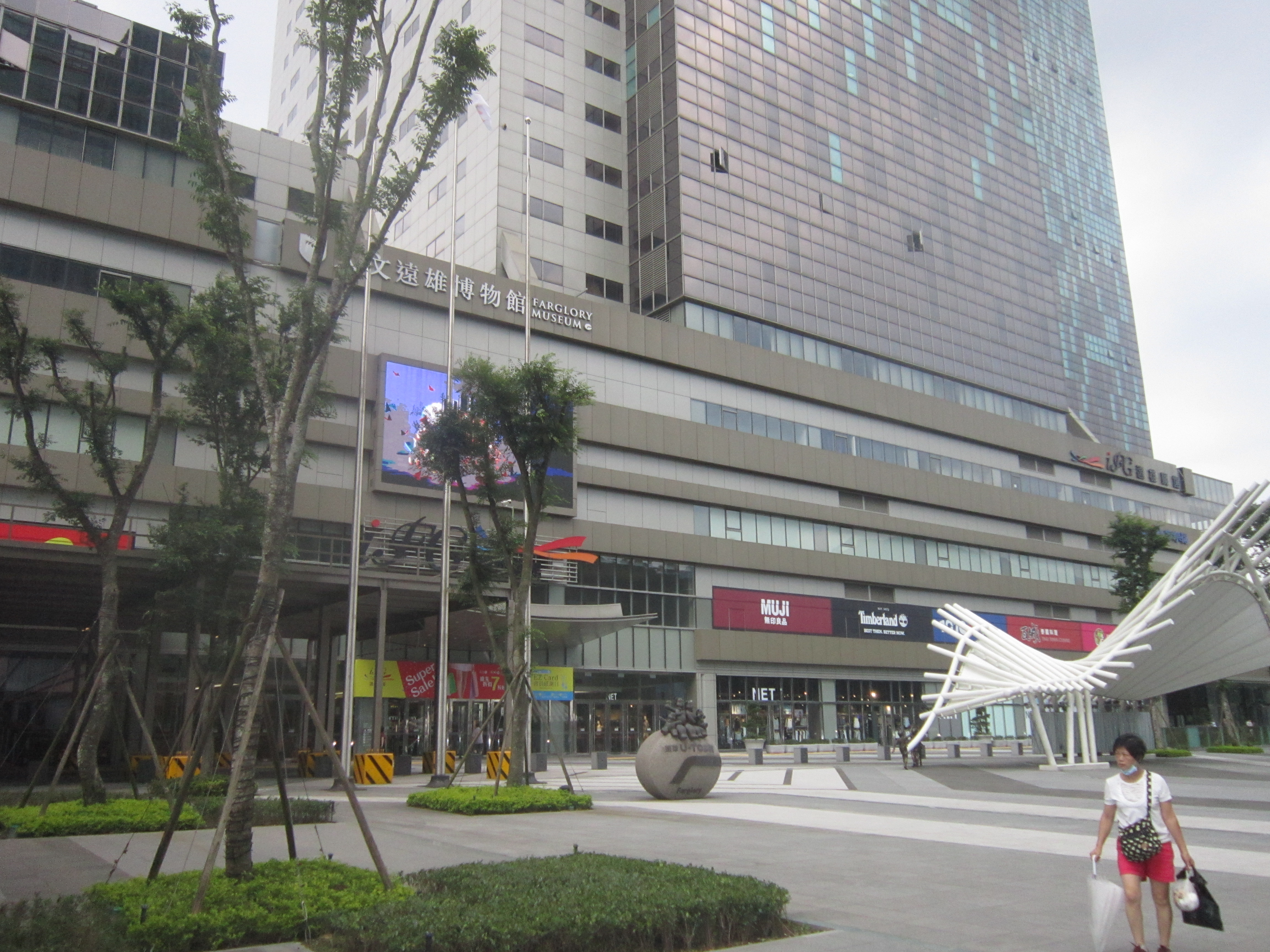 遠雄購物中心及一旁的博物館